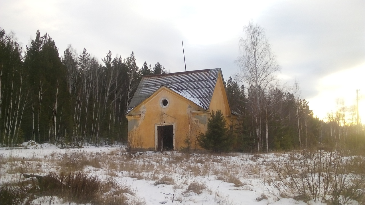 Старая Анбашская станция (сзади), в посёлке Анбашская